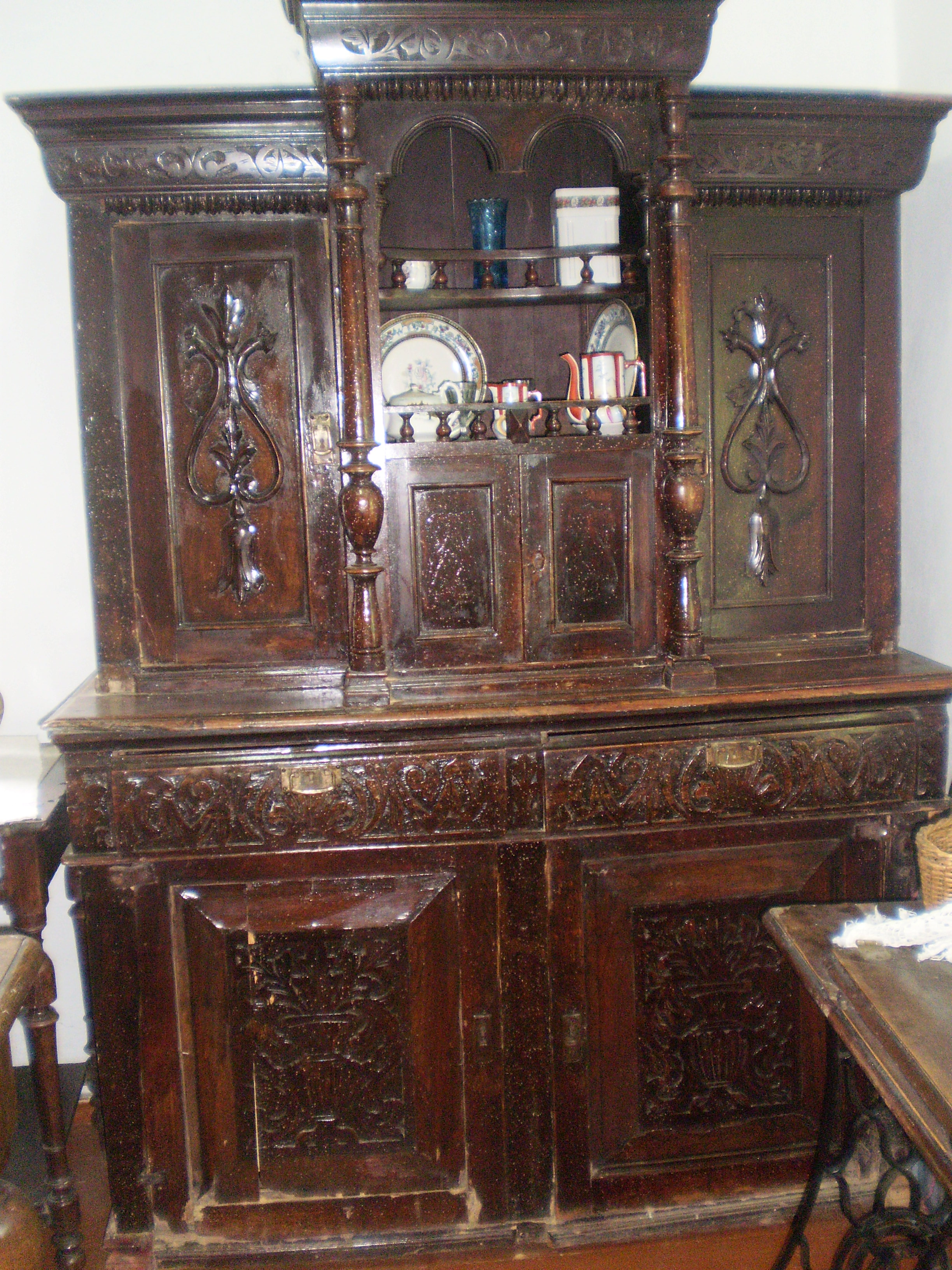 Садиба-музей Марко Вовчок, Богуслав